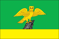 no original description